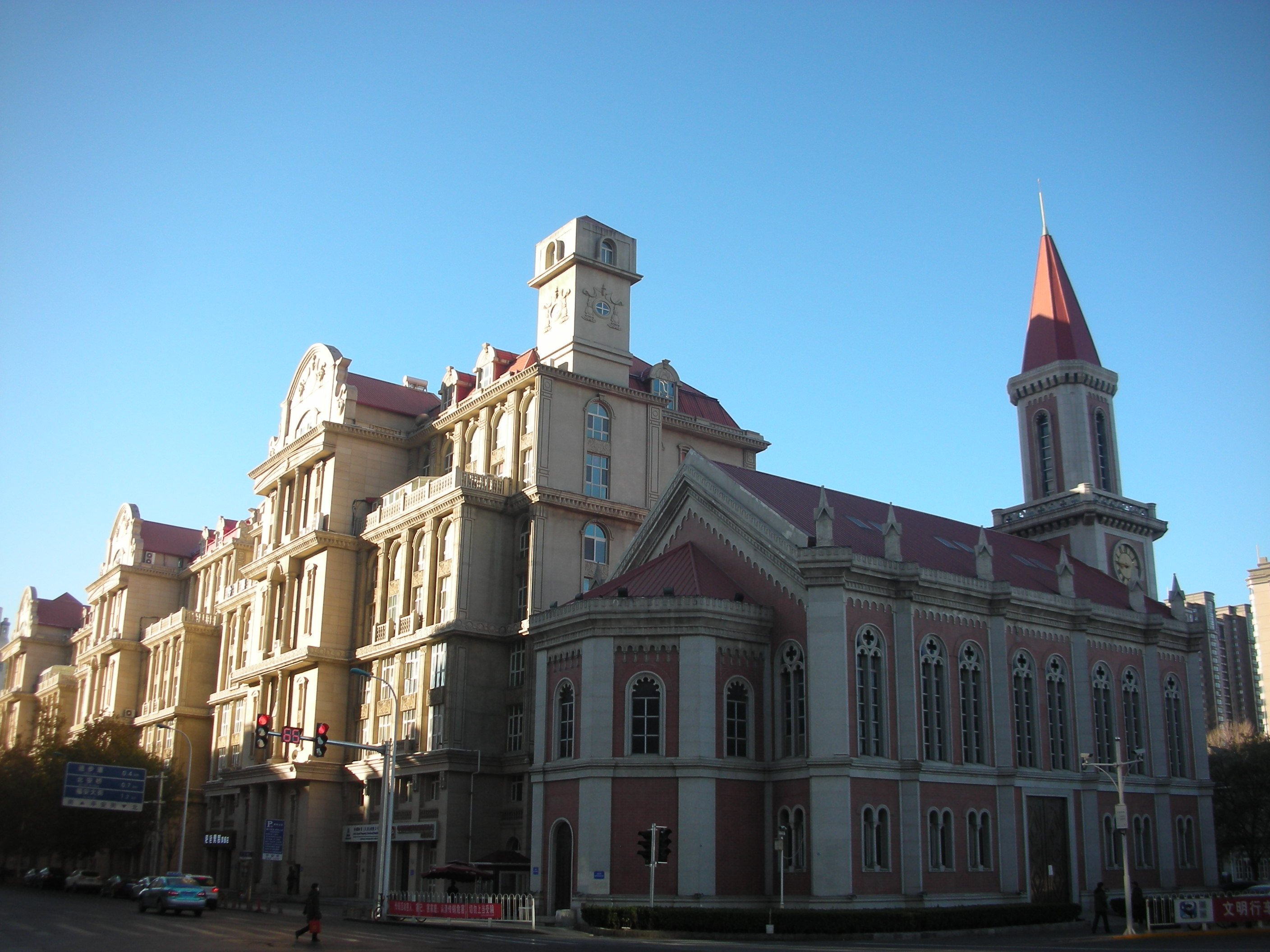 天津市區的西式建築。